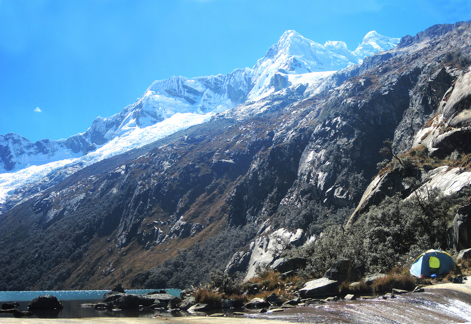 Nevado Hualcan